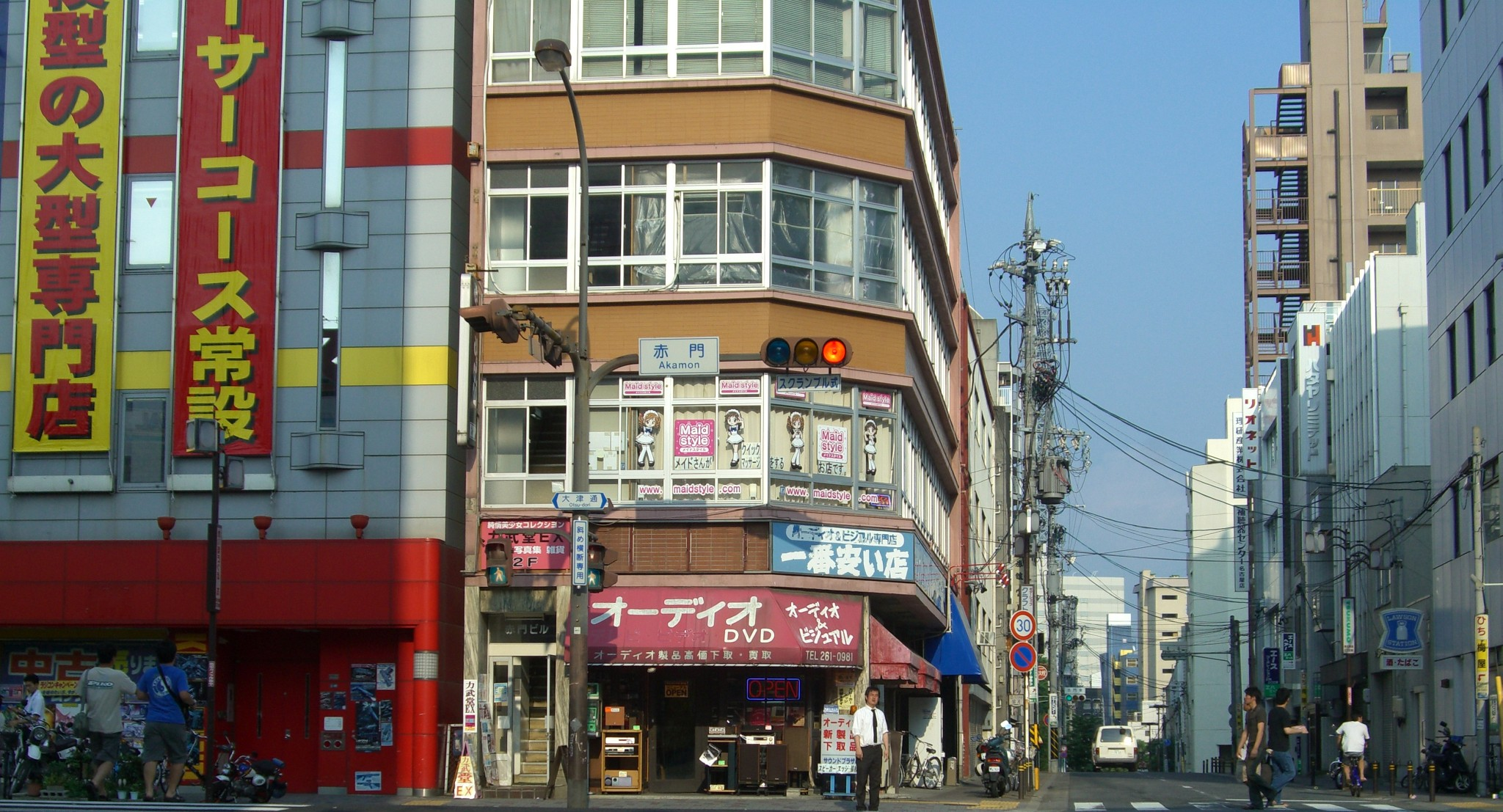 赤門交差点 (愛知県名古屋市中区大須)